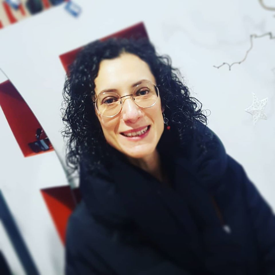 Filosofa, saggista e traduttrice italiana